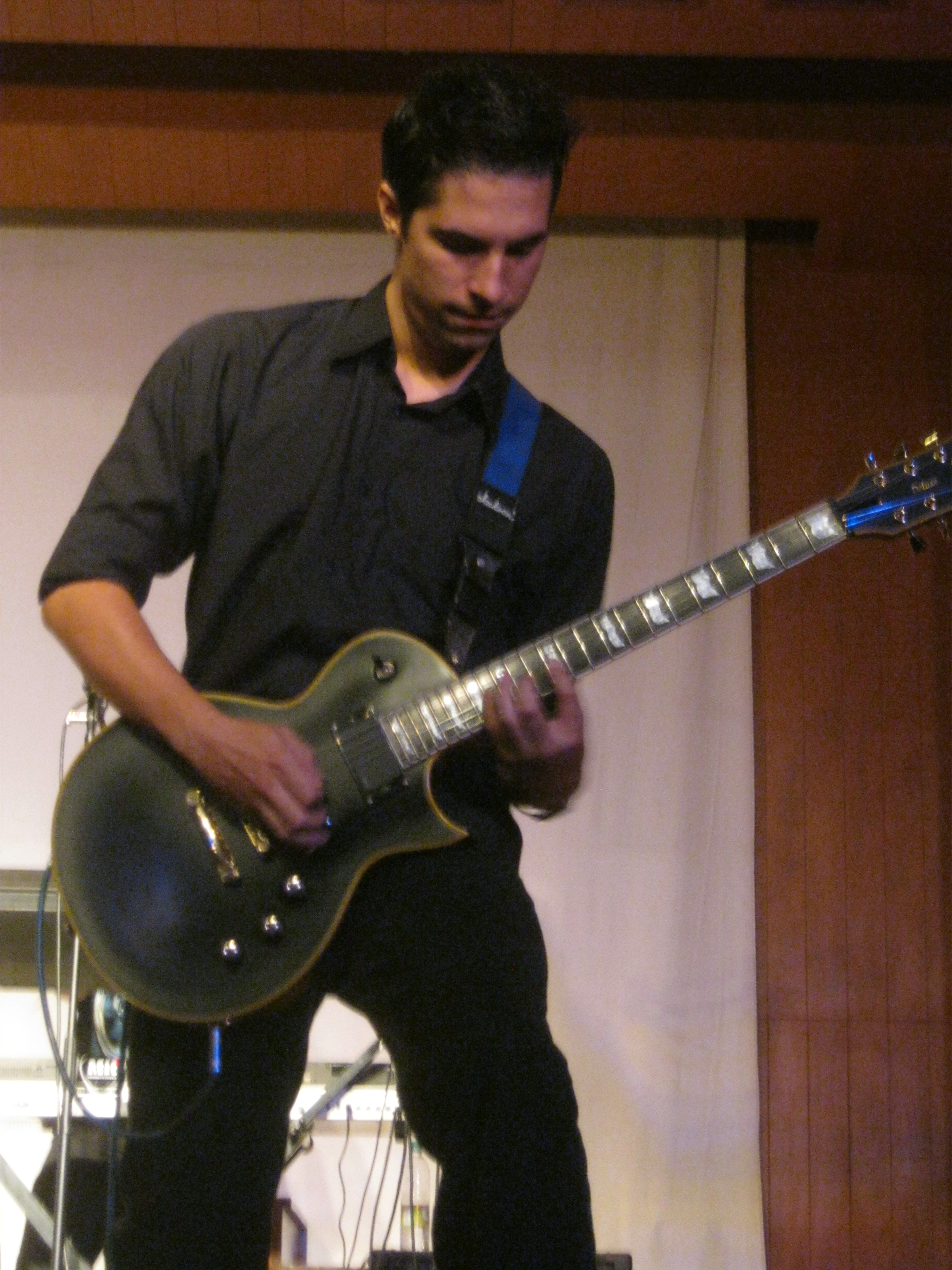 Concierto en conmemoración de los 15 años de la banda caleña de metal progresivo Legend Maker